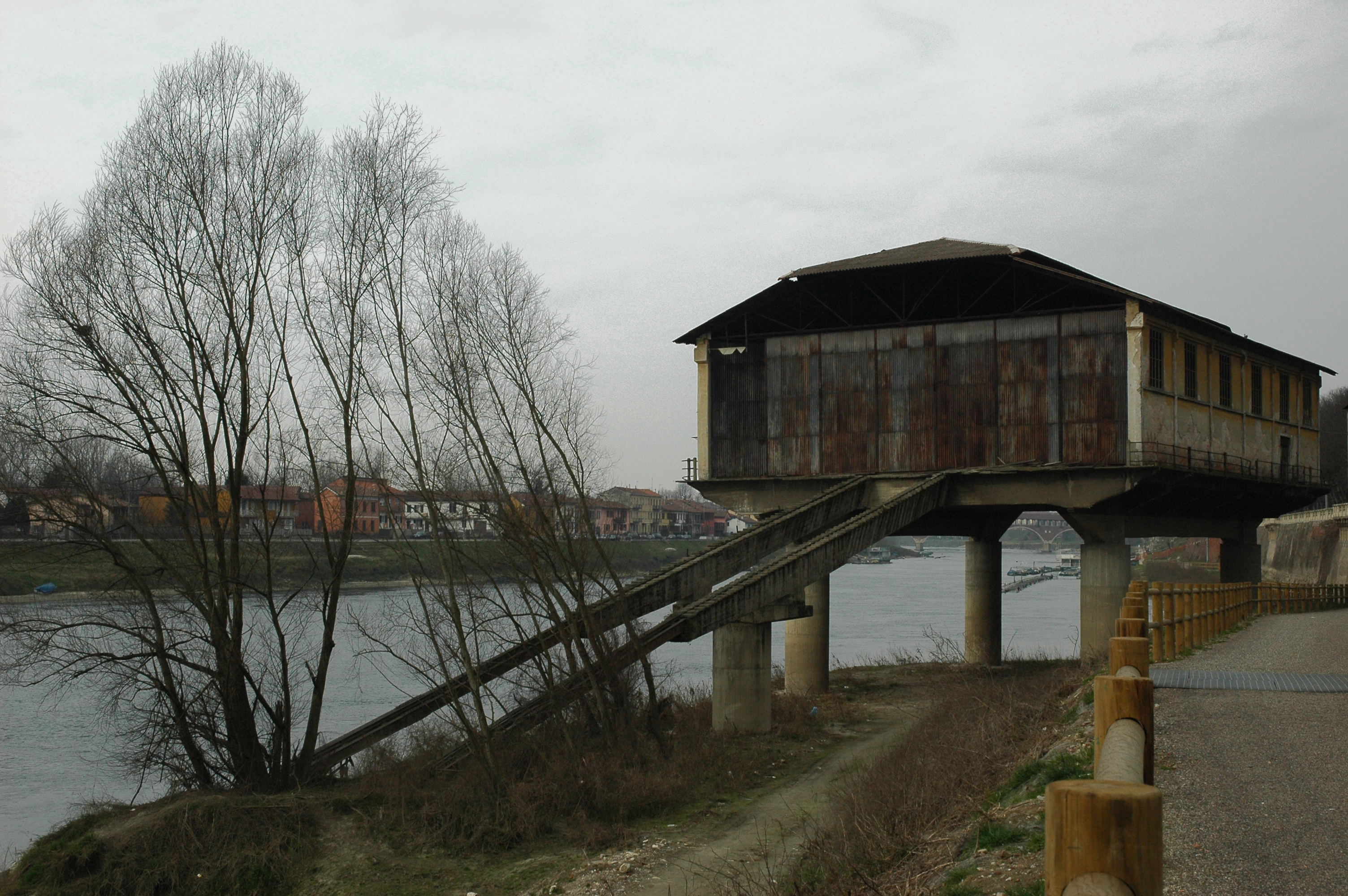 L'idroscalo di Pavia nel 2007